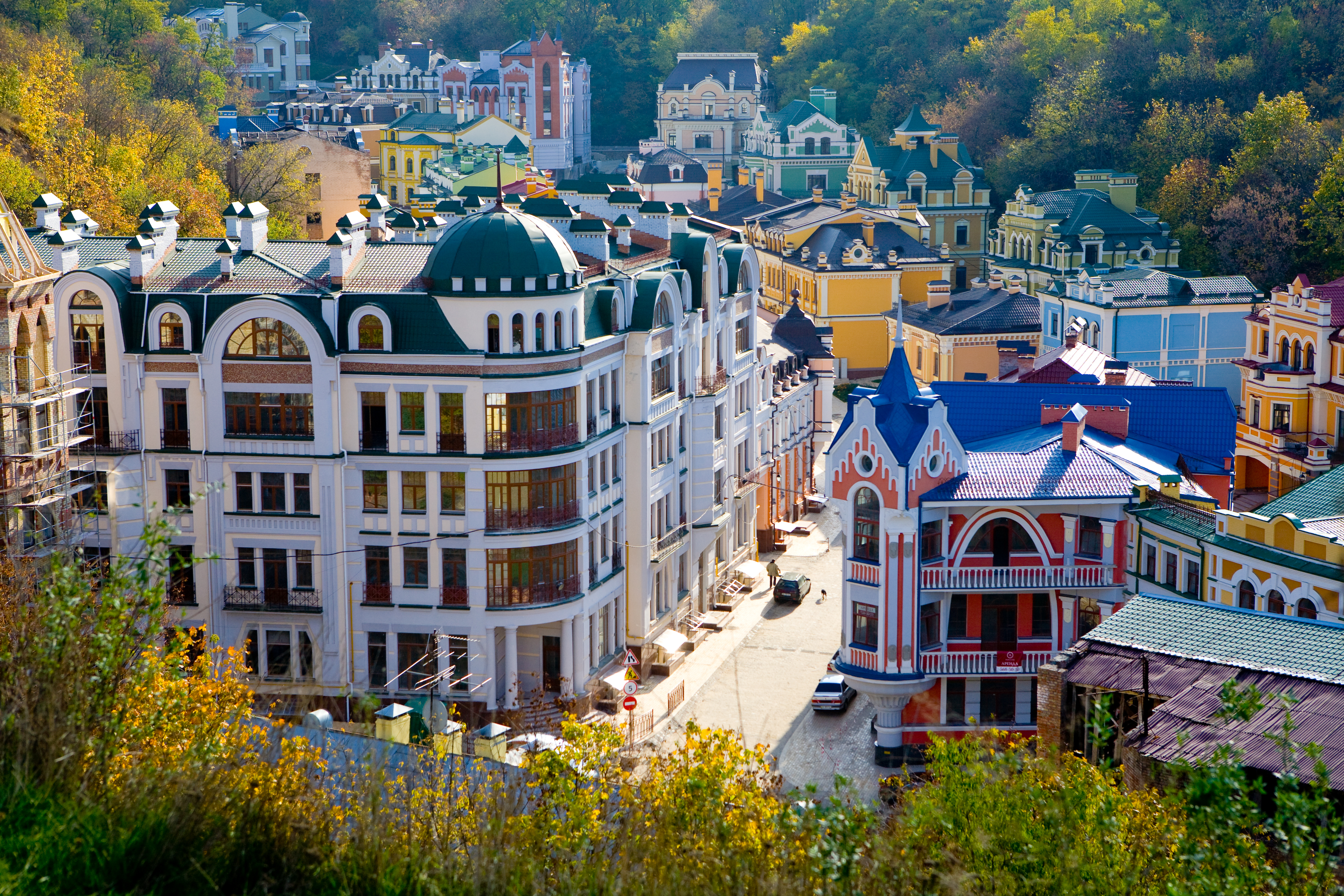 Жилой Комплекс "Воздвиженка"